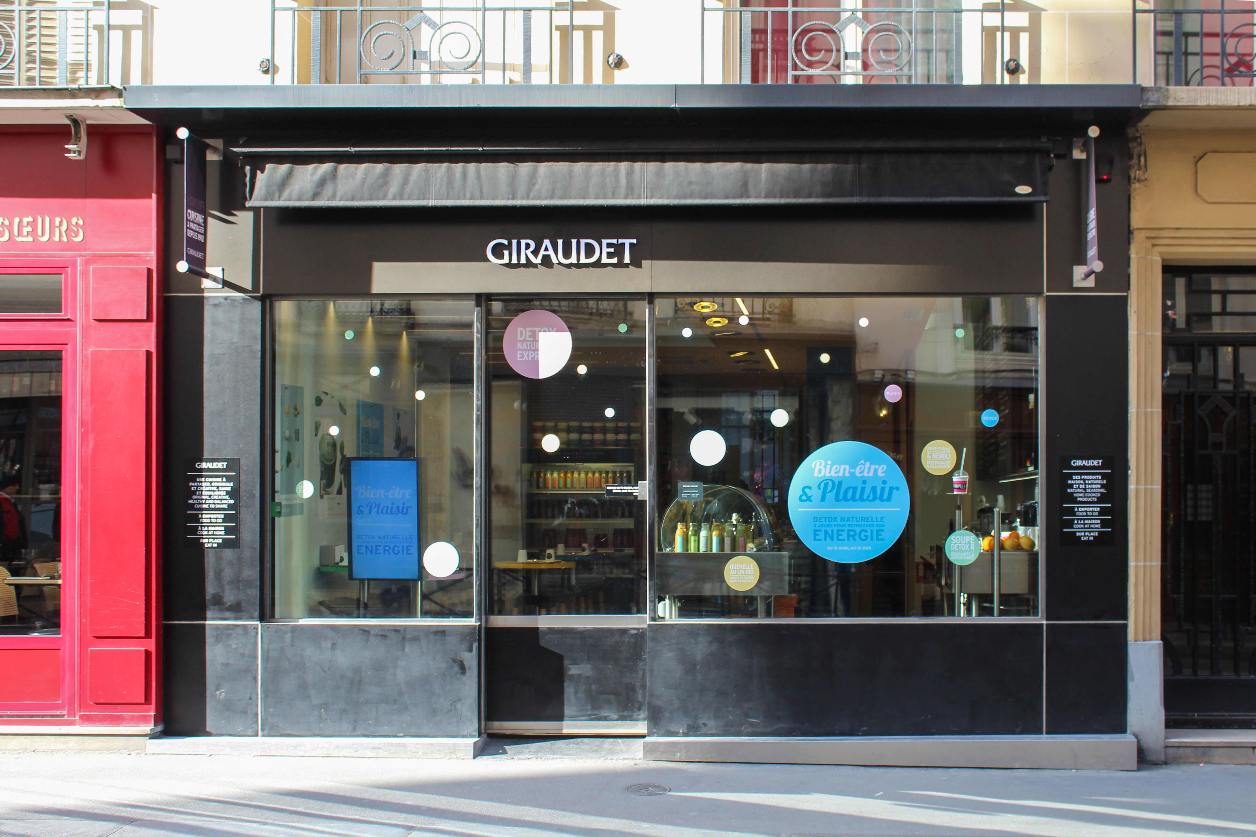 Boutique Giraudet, 6 rue du Pas de la Mule, Paris.